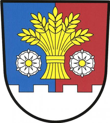 znak, Úlibice, okres Jičín